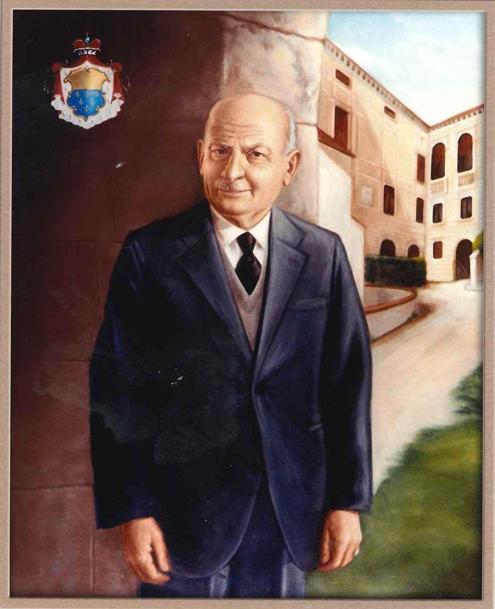 Il quadro realizzato dal pittore Ulisse Sartini rappresenta Guecello Pirro Giovan Battista, XVII° Principe di Porcia e Brugnera